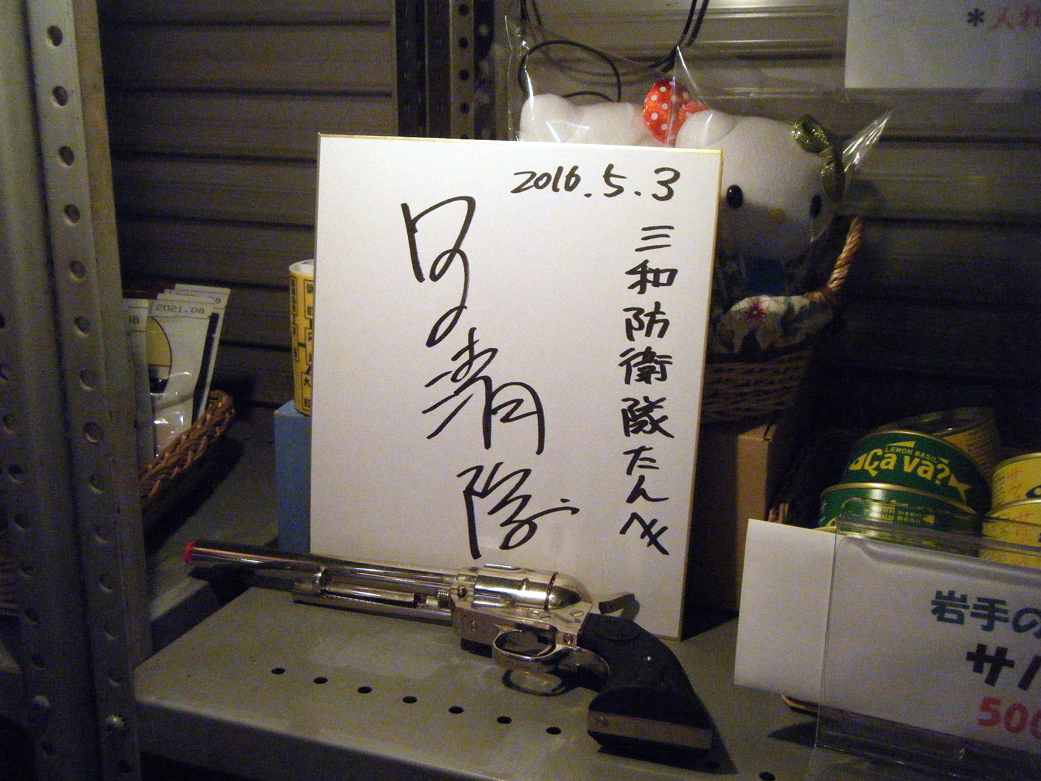 田口清隆監督のサイン 三和市場イベント「怪獣市場デラックス2」にて 兵庫県尼崎市